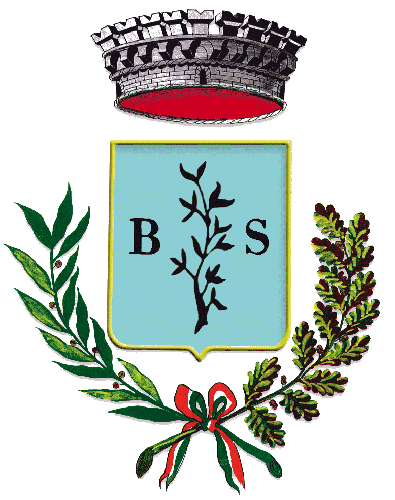 Stemma di Bussi sul Tirino